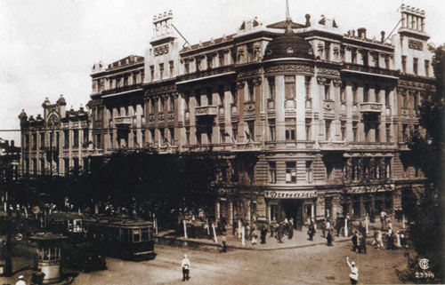 Бывший дом Карапета Чернова на старой открытке.